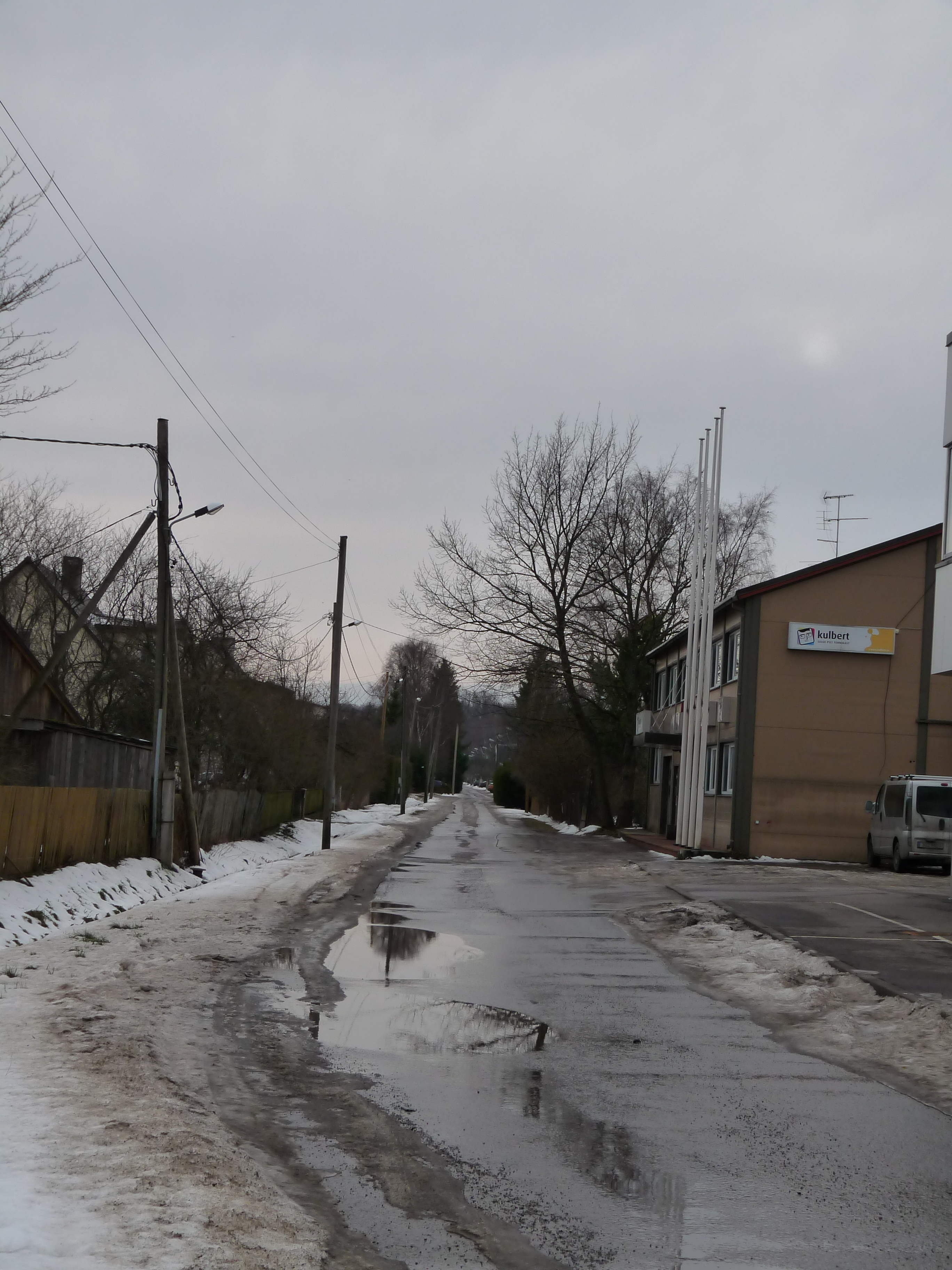 Sirge street in Tallinn, Estonia